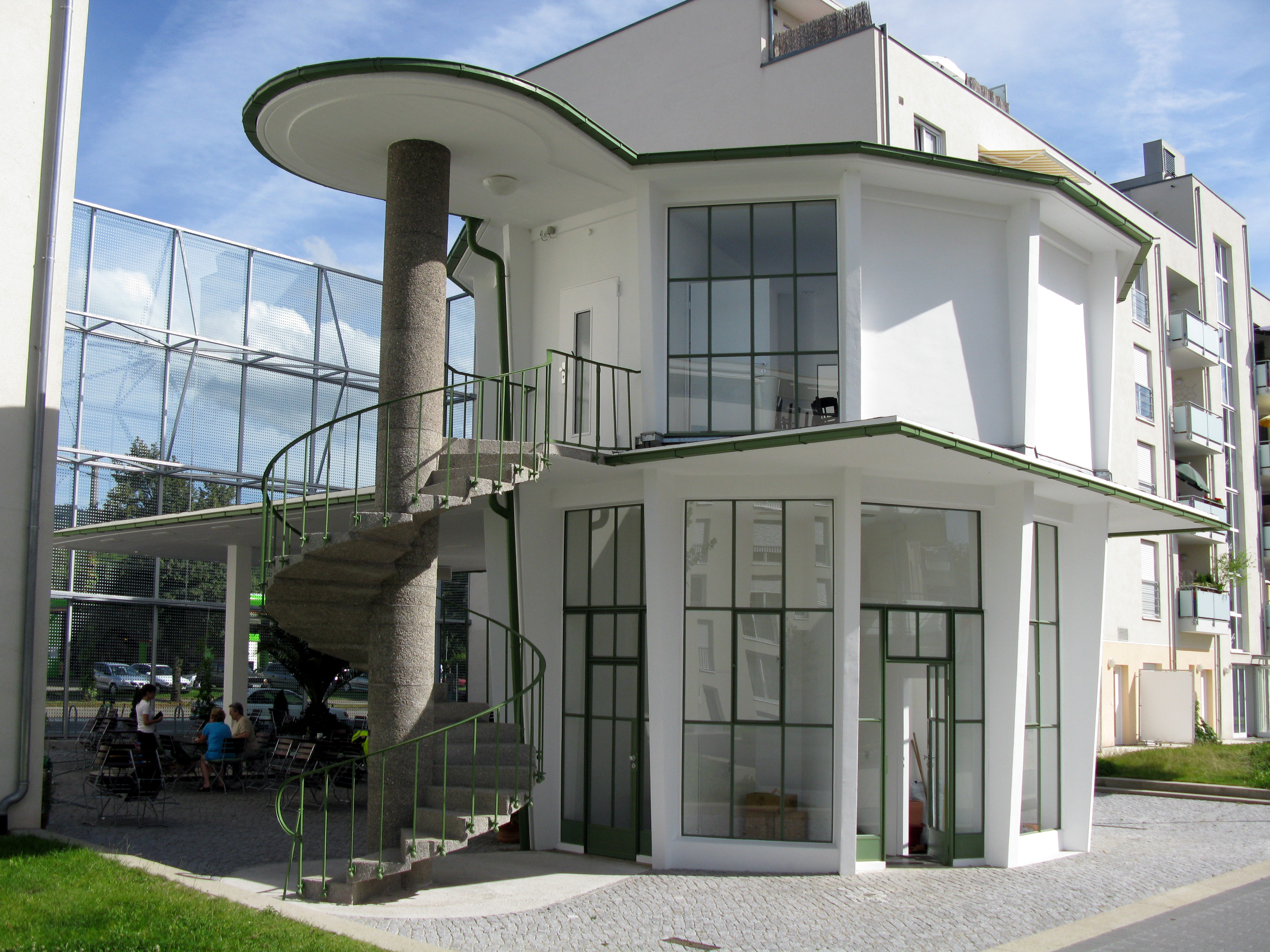 Turmcafé, ehemalige Tankstelle, unter Denkmalschutz, Zähringer Straße 44